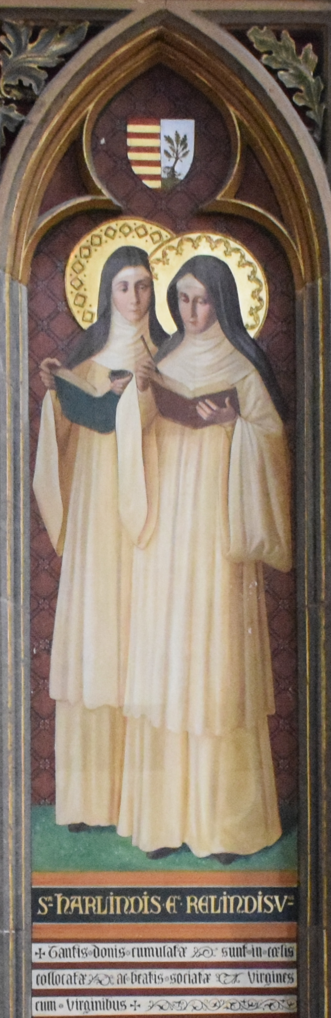 Vue de la cathédrale Saint-Paul à Liège (Belgique).